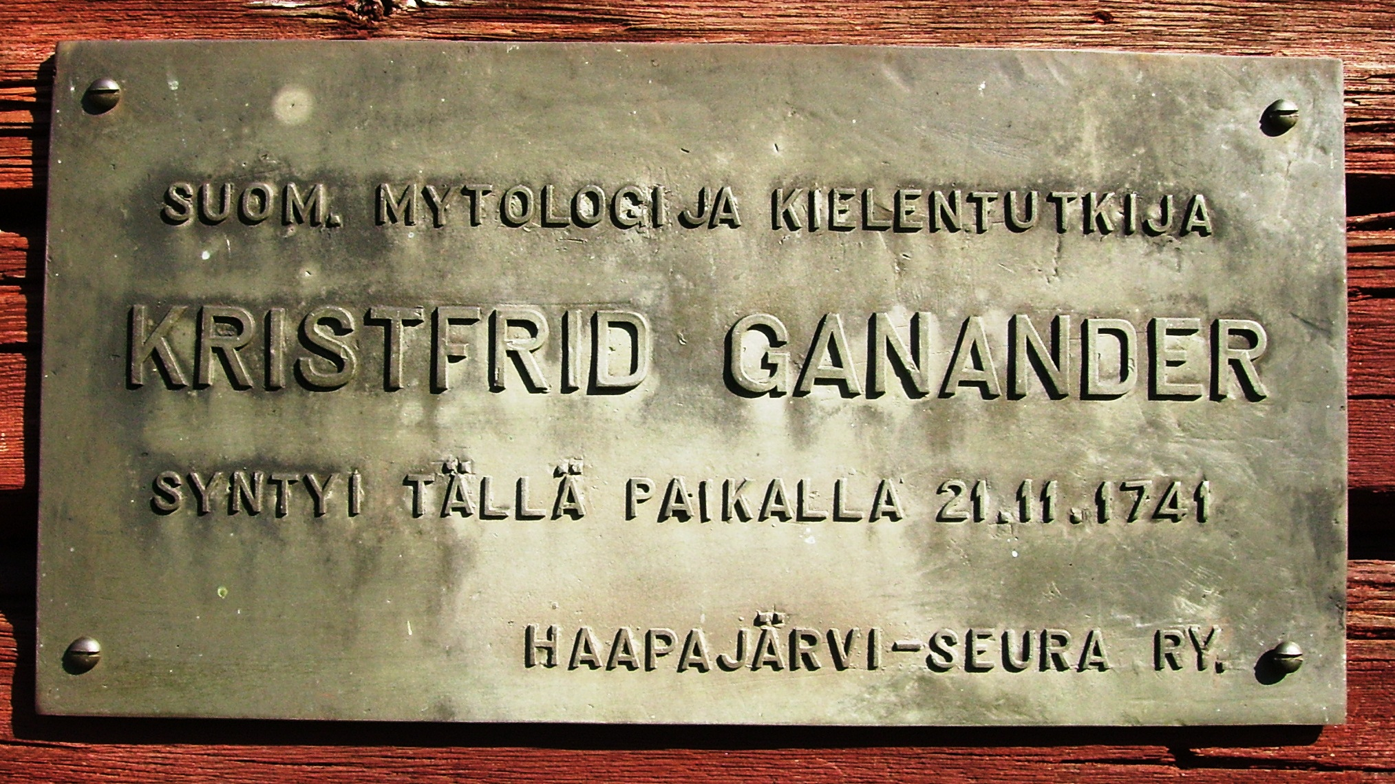 Plakat vid Christfrid Gananders födelsehem i Haapajärvi, Österbotten, Finland.